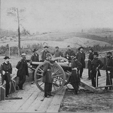 William Tecumseh Sherman und sein Stab außerhalb von Atlanta, 1864.